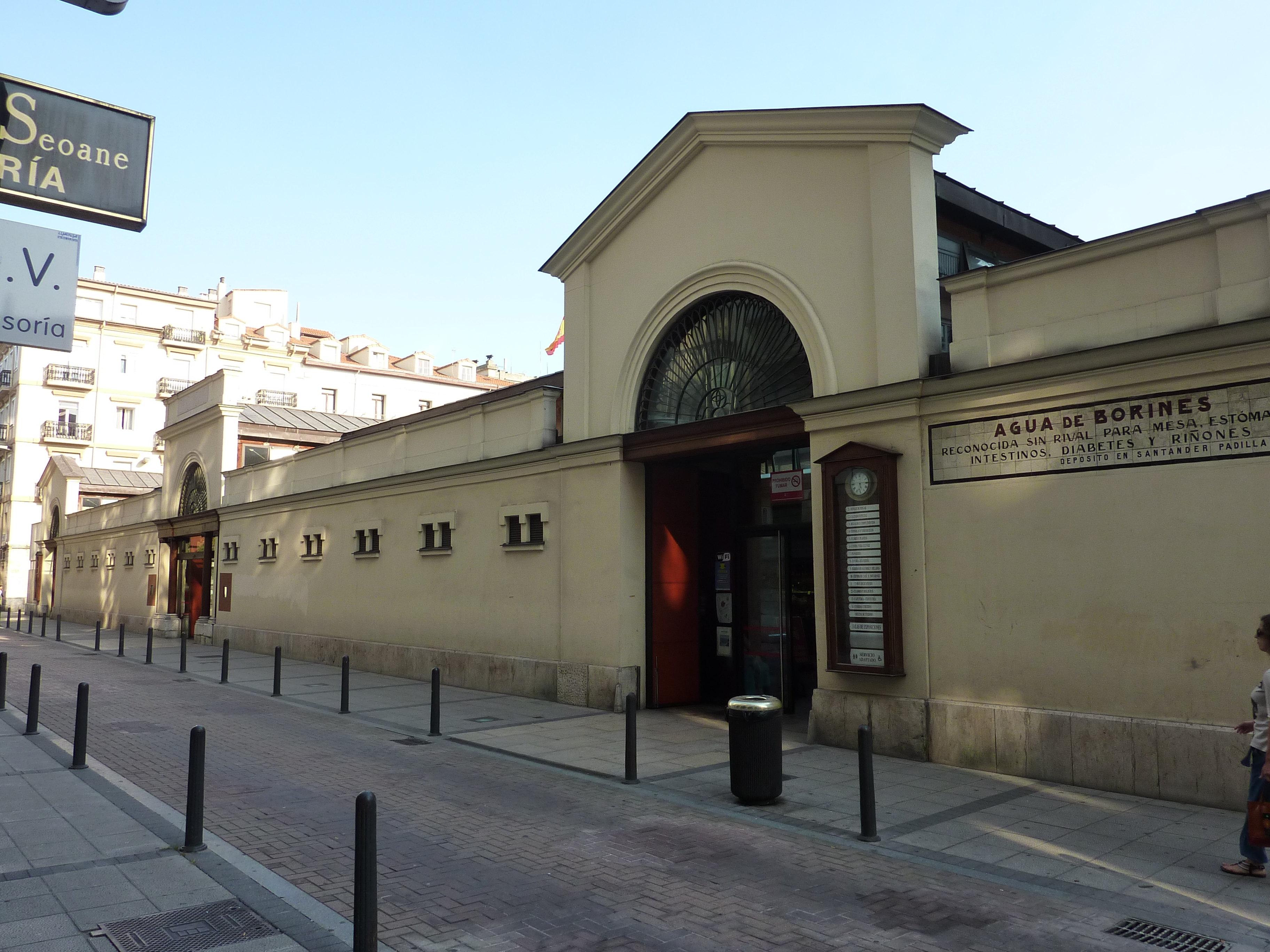 Fachada norte.